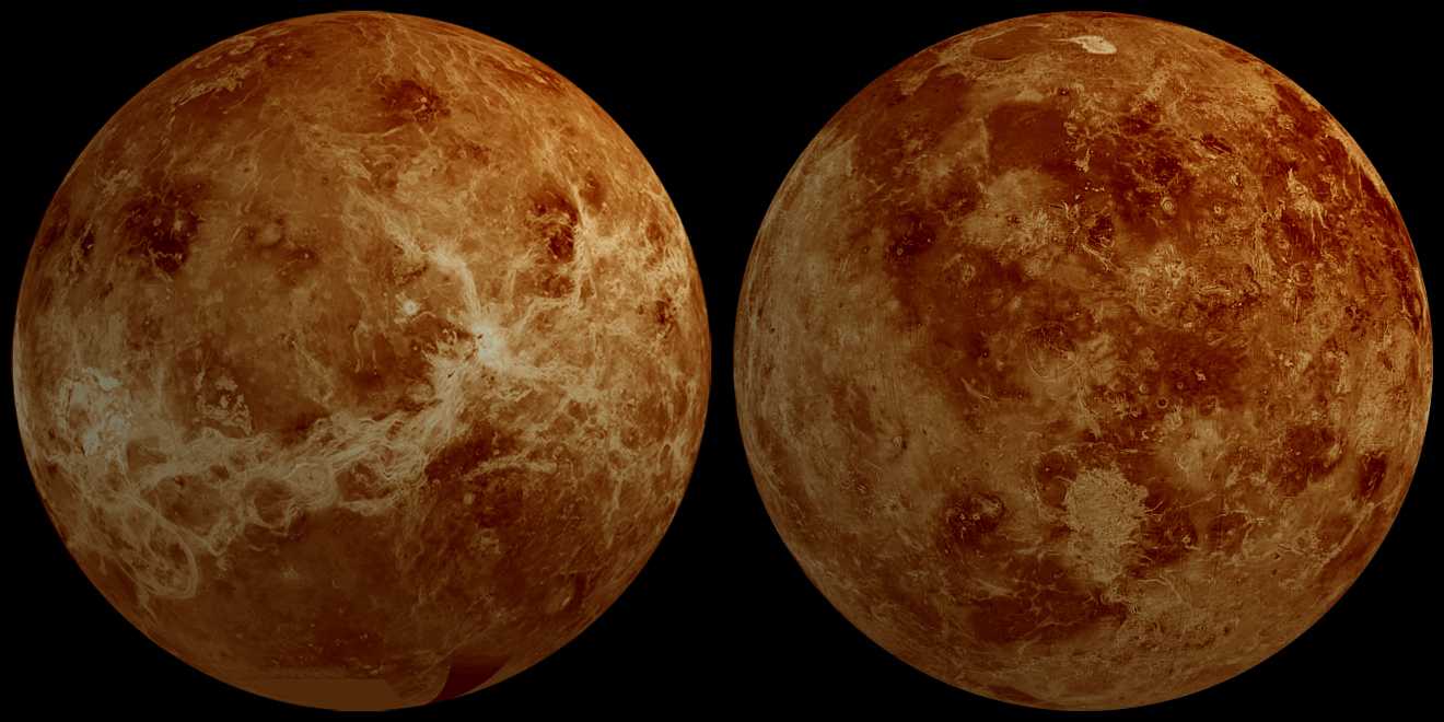 Radarkarte der Venus von verschiedenen Seiten aus gesehen. Die einzelnen Originale wurden von der Raumsonde Magellan aufgenommen und sind von der NASA freigegeben und damit PD - habe sie zusätzlich grafisch aufgewertet. Die verwendeten Farben entsprechen keinen realen Farben der Venuskruste.